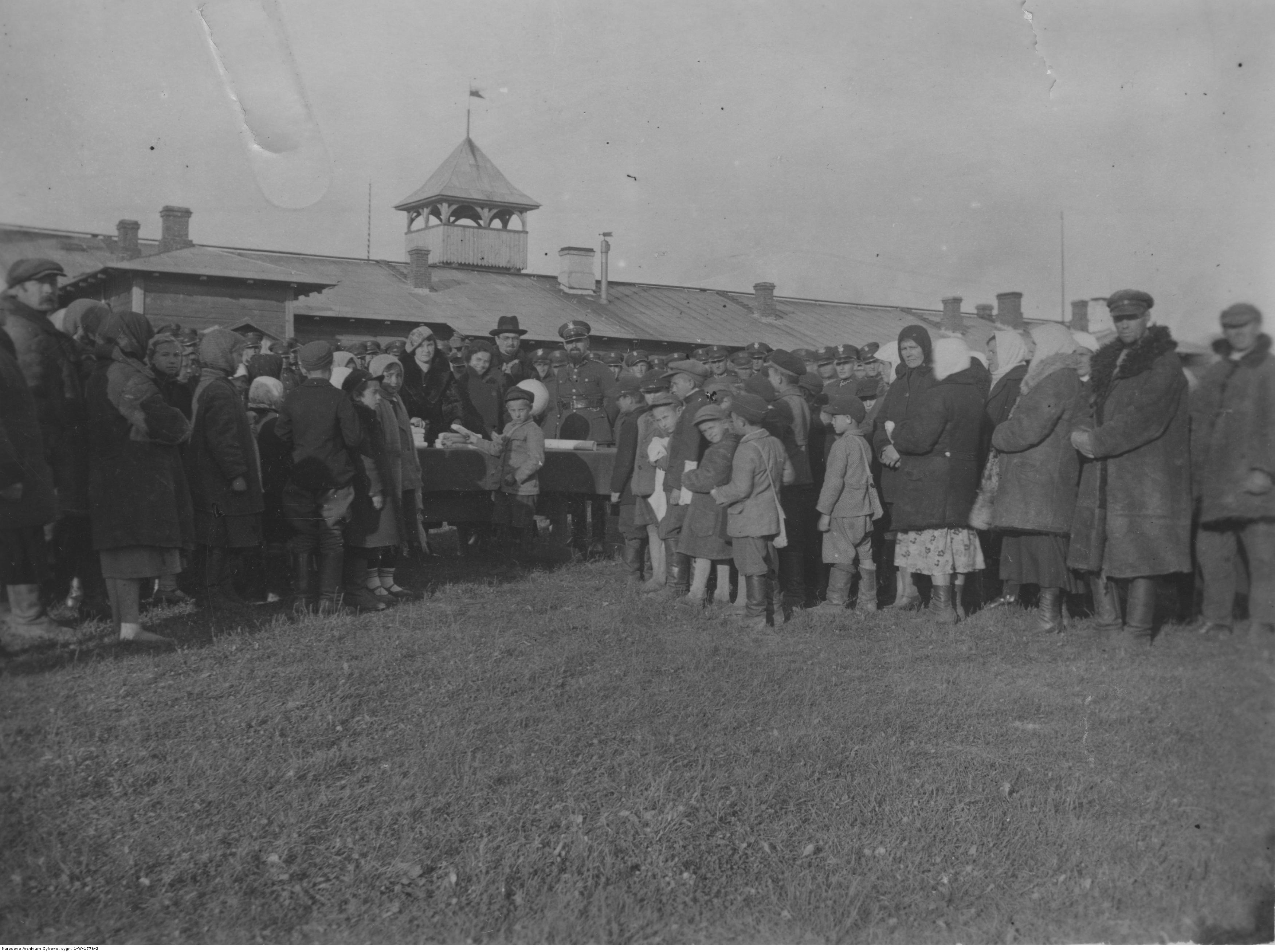 Zgromadzenie żołnierzy i miejscowej ludności przed koszarami w Ćwiecinie. Koncern Ilustrowany Kurier Codzienny - Archiwum Ilustracji Sygnatura: 1-W-1776-2